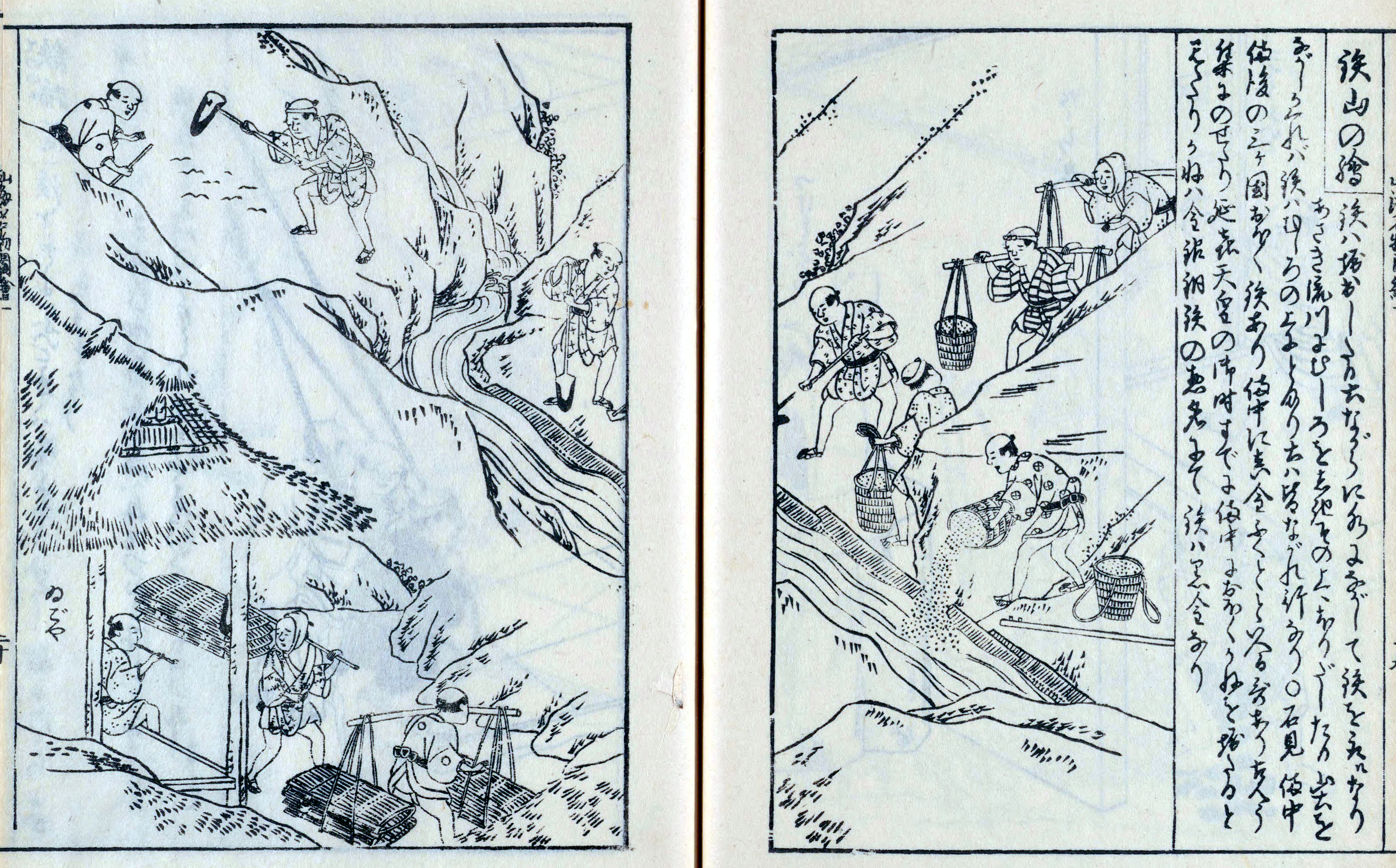 日本山海名物図会 第一巻 鉄山の絵 鉄穴流しの様子